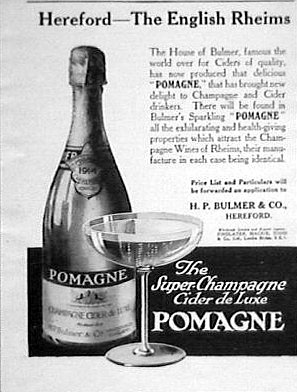 Print advertisement for Pomagne cider